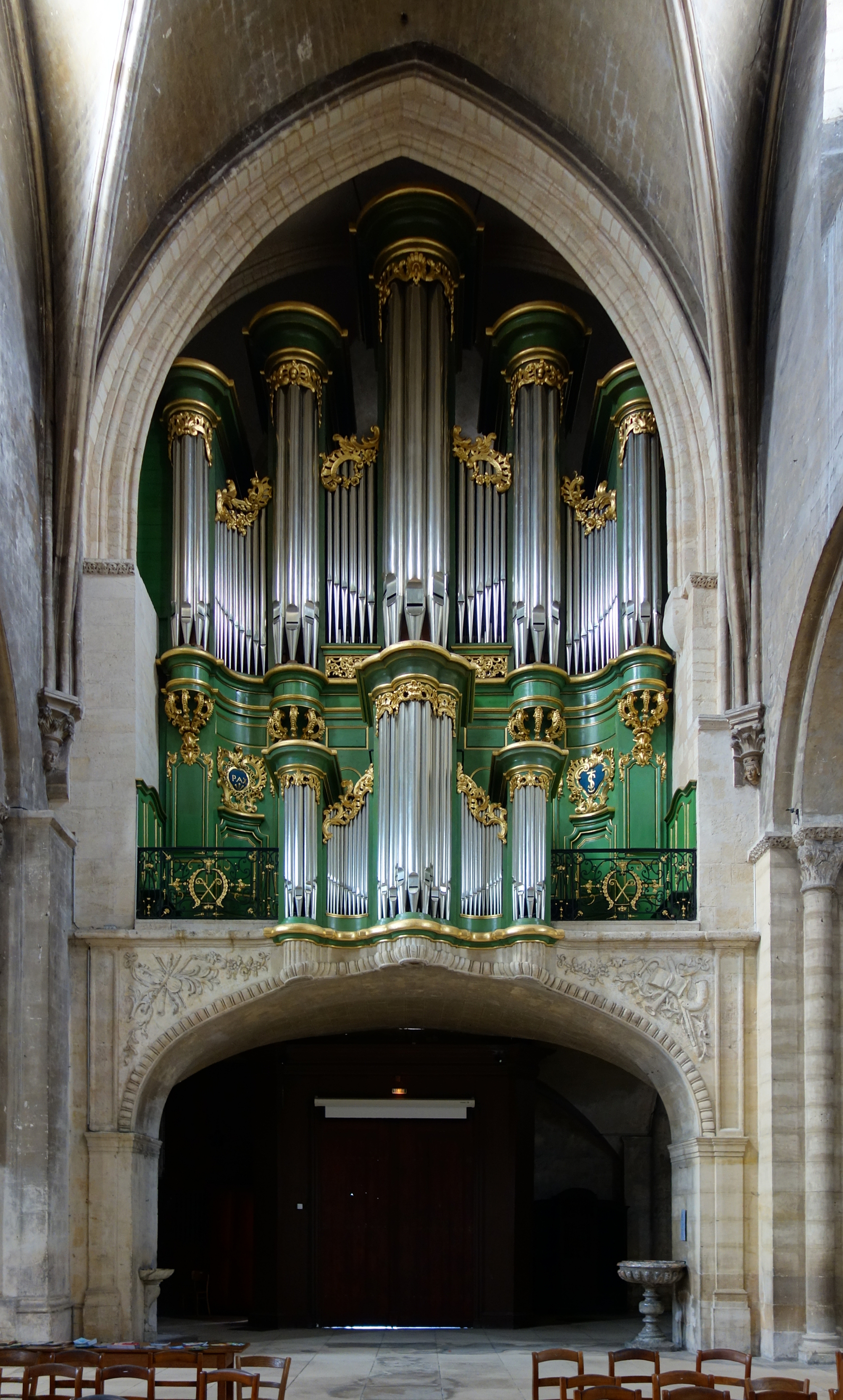 L'orgue de l'église Sainte Croix de Bordeaux.